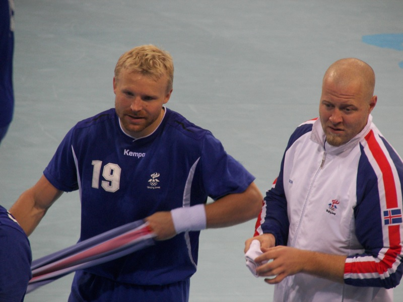 Ingimundur Ingimundarson and Sigfús Sigurðsson